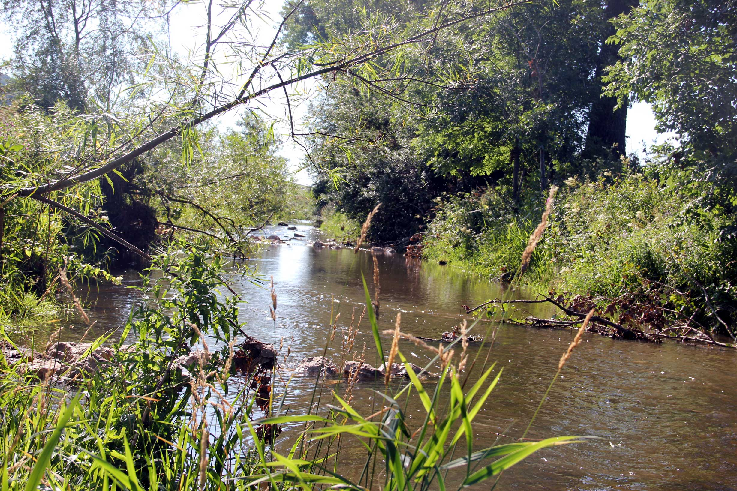 Fluss Eger (Wörnitz) bei Bopfingen